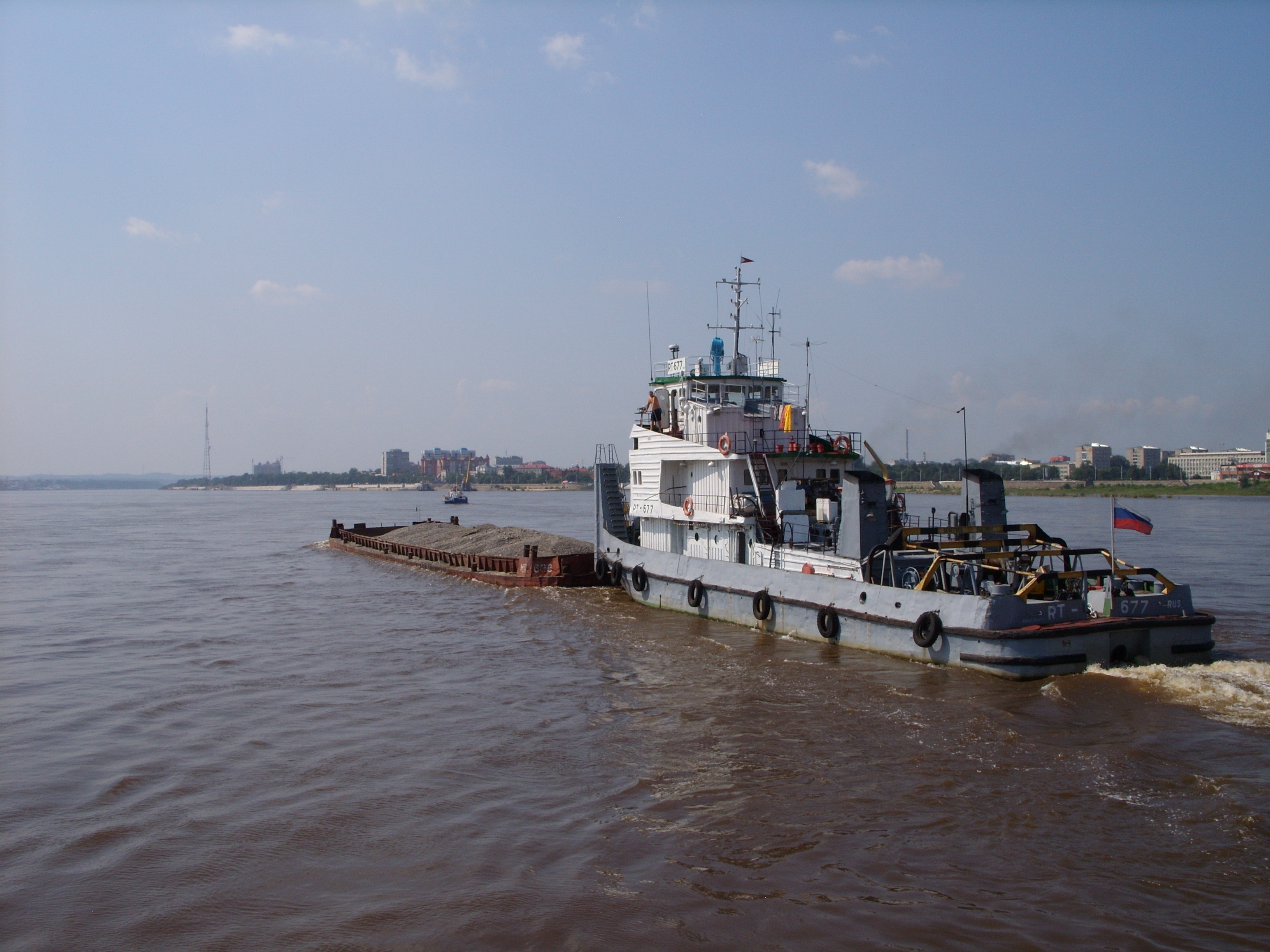 Снимки августа 2011 г.